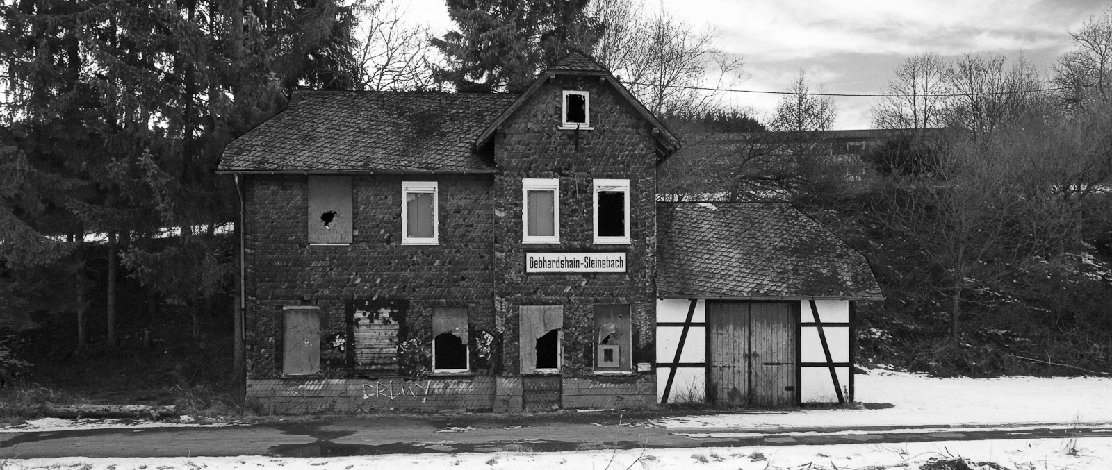 Bahnhof Steinebach